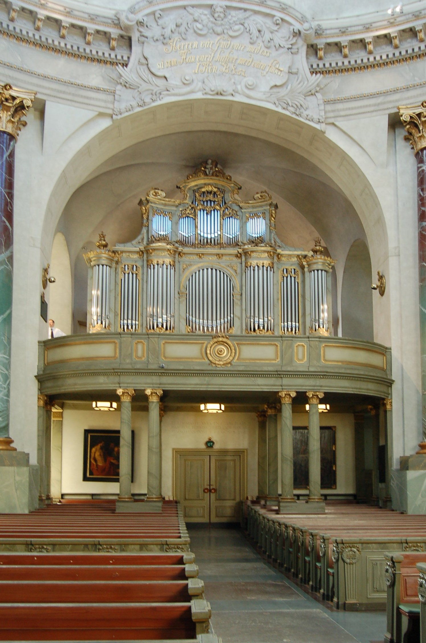 Vy mot orgeln i Hedvig Eleonora kyrka i Stockholm.